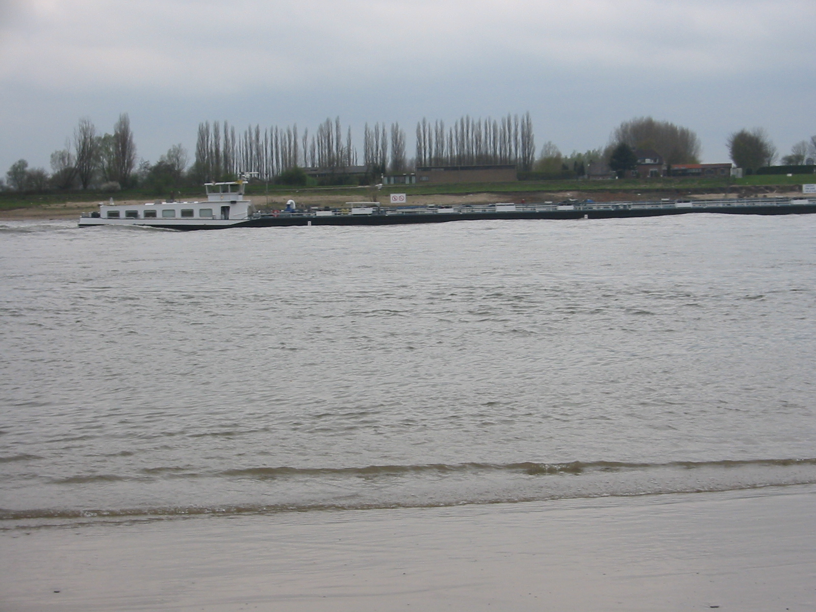 Eigen foto. GerardM 10 apr 2004 07:33 (CEST)